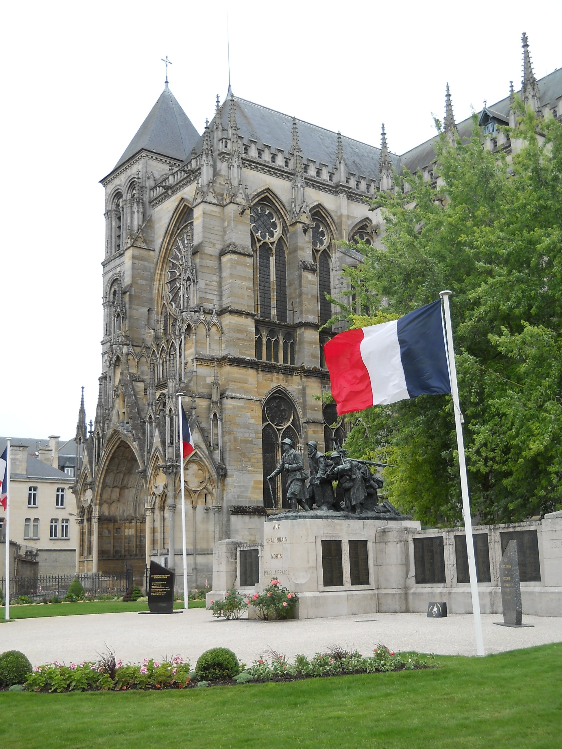 Châlons-en-Champagne, Kathedrale St-Etienne, Blick zum südlichen Querhaus